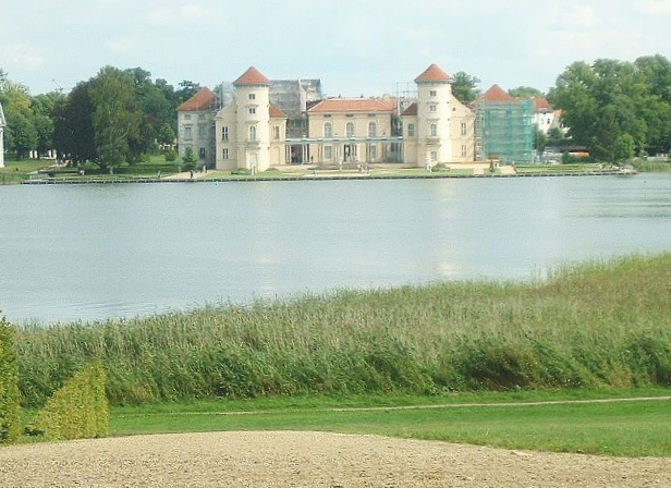 Schloss Rheinsberg in Rheinsberg in Brandenburg, fotografiert vom gegenüberliegenden Seeufer.